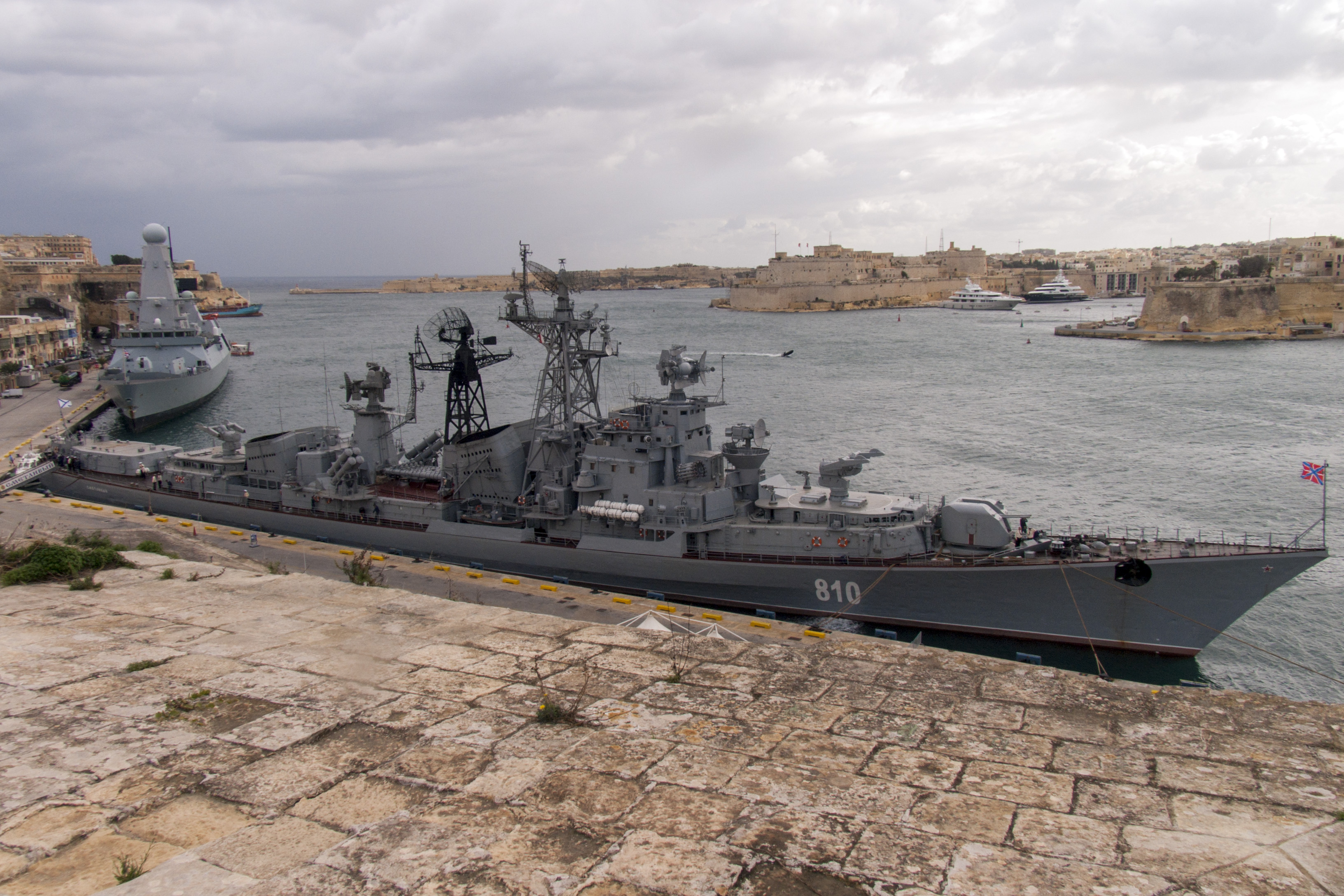 Сторожевой корабль "Сметливый" в Валлетте